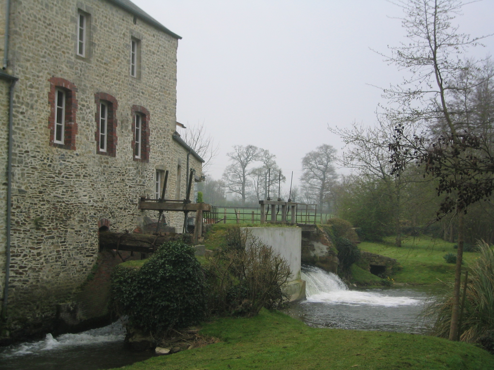 Le Moulin de Hard (XVIIIème siècle) à Subles (Calvados, France)